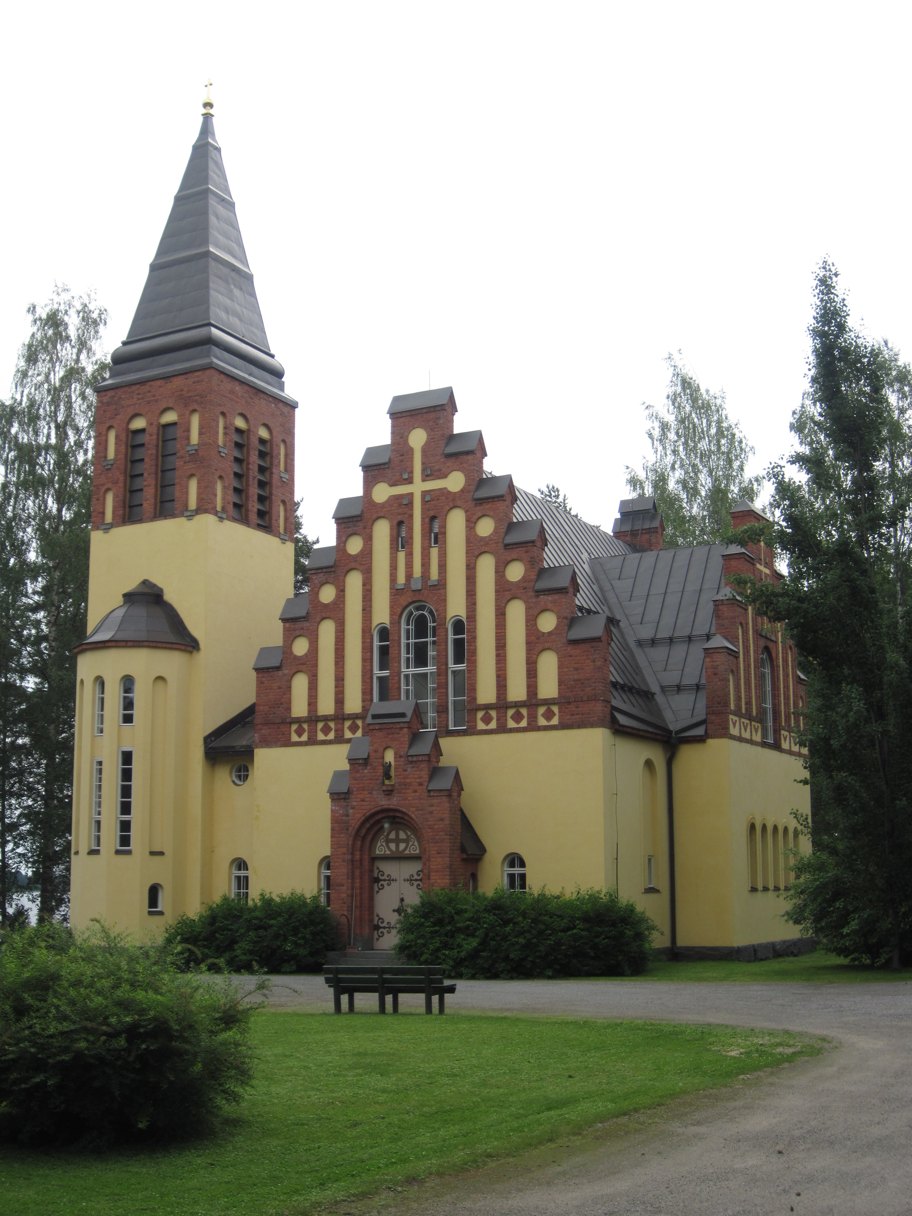 Tervon kirkko kesällä 2012